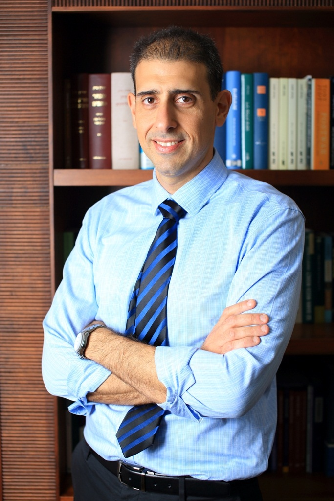 פרופסור יעד רותם